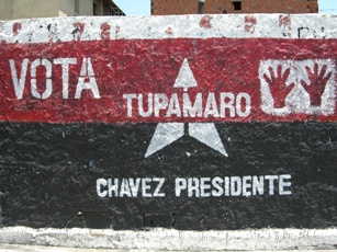 Propaganda electoral del partido político venezolano Tupamaro.